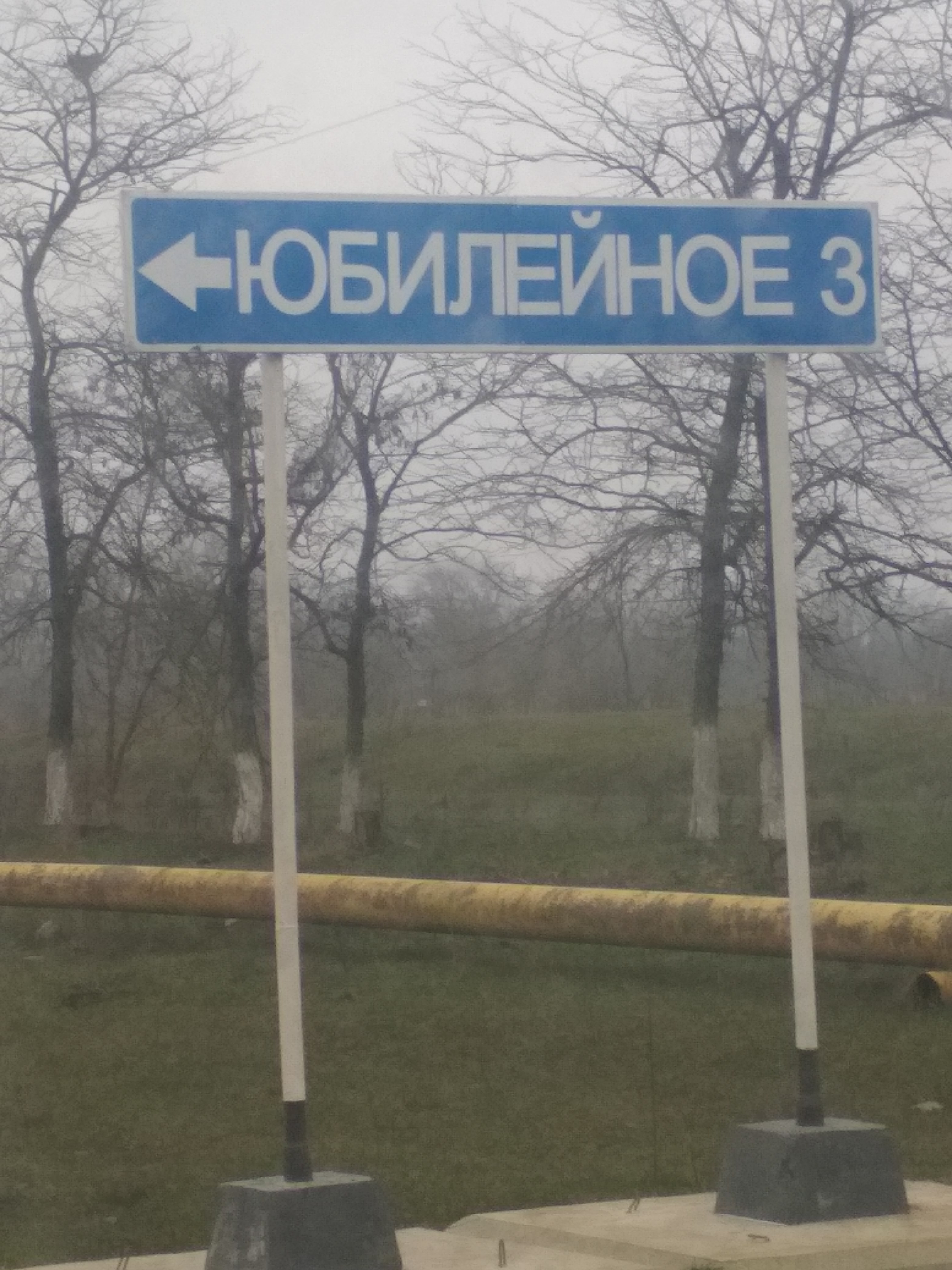 Нохчийн: В Юбилейное